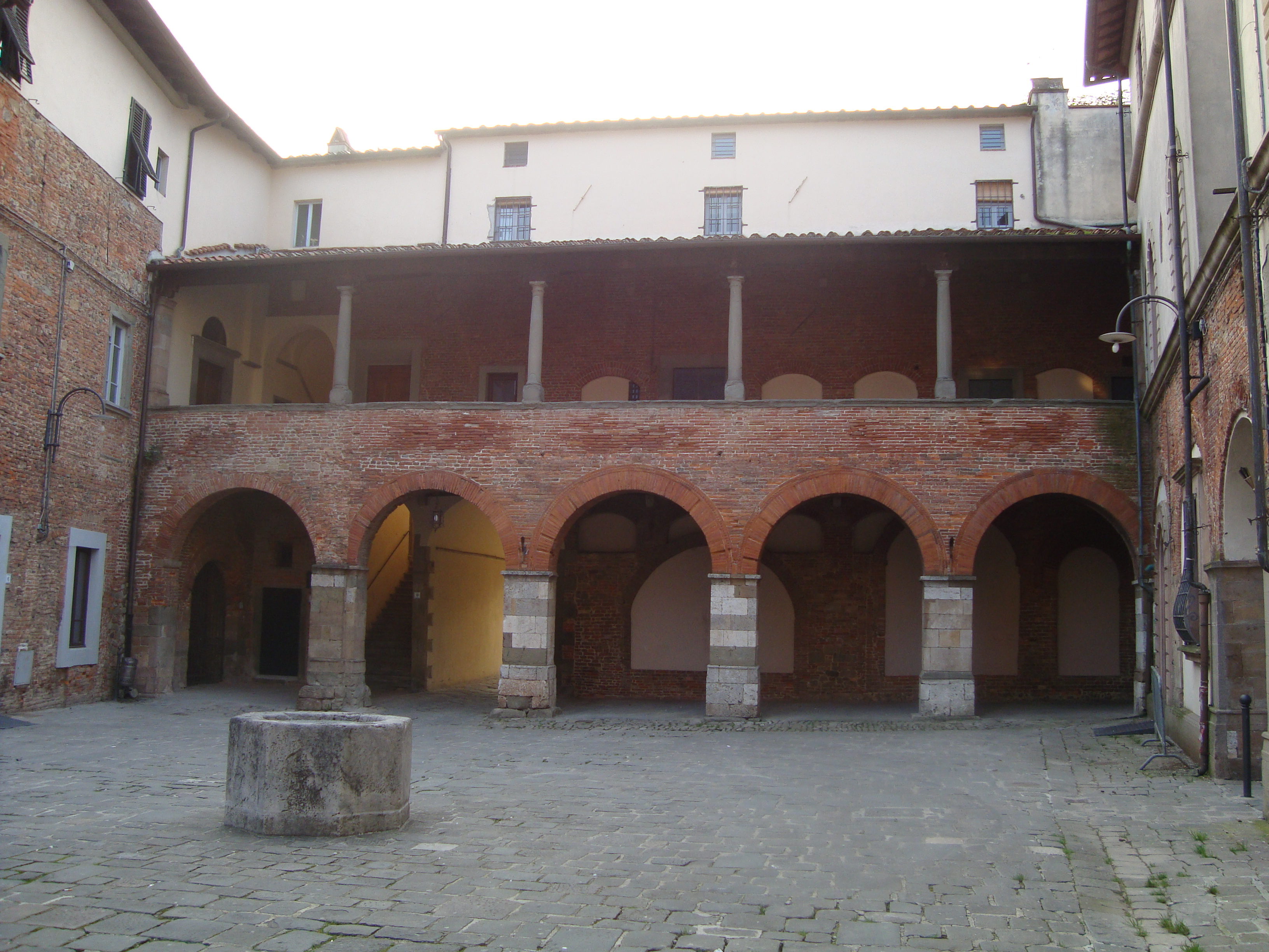 Piazza Degli Ospitalieri